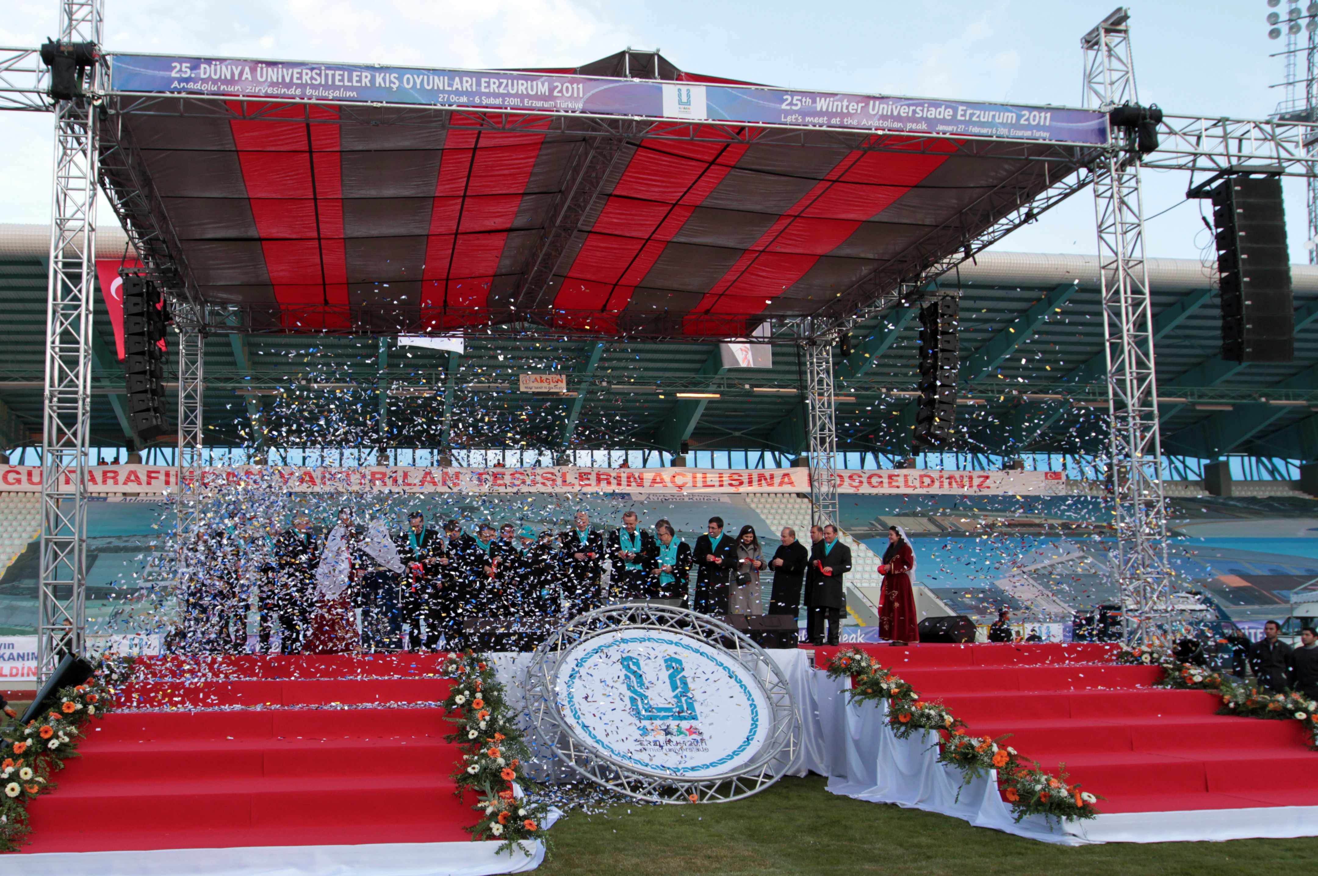 Greek Prime Minister George Papandreou and Turkish Prime Minister Recep Tayyip Erdoğan in Erzurum, Turkey.